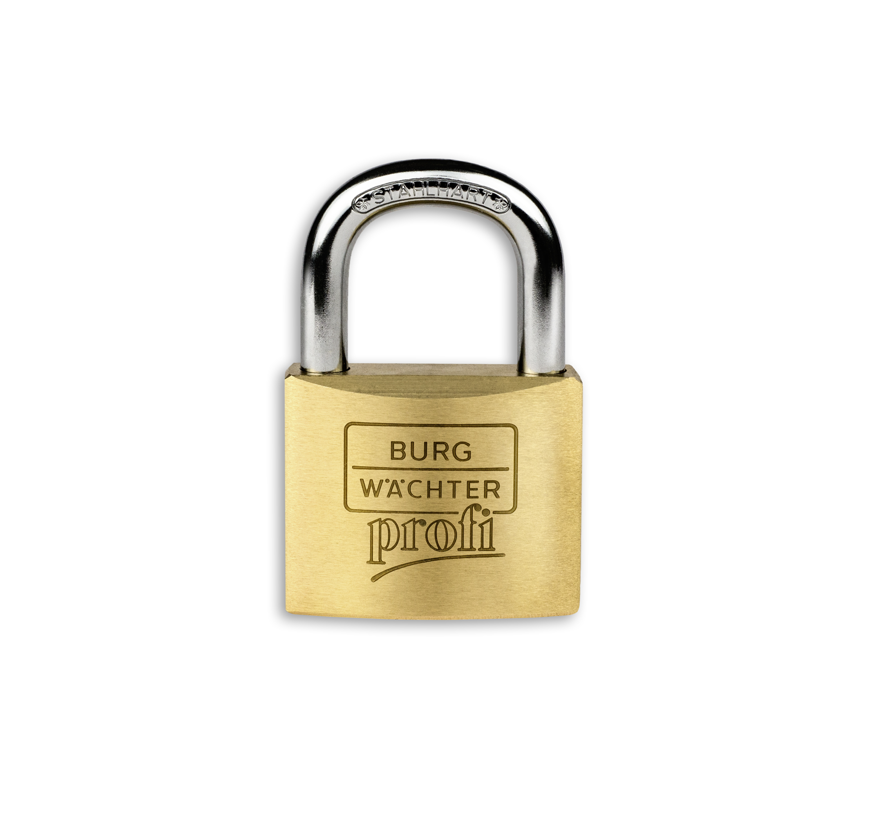 Das Bügelschloss Profi 116 von Burg-Wächter